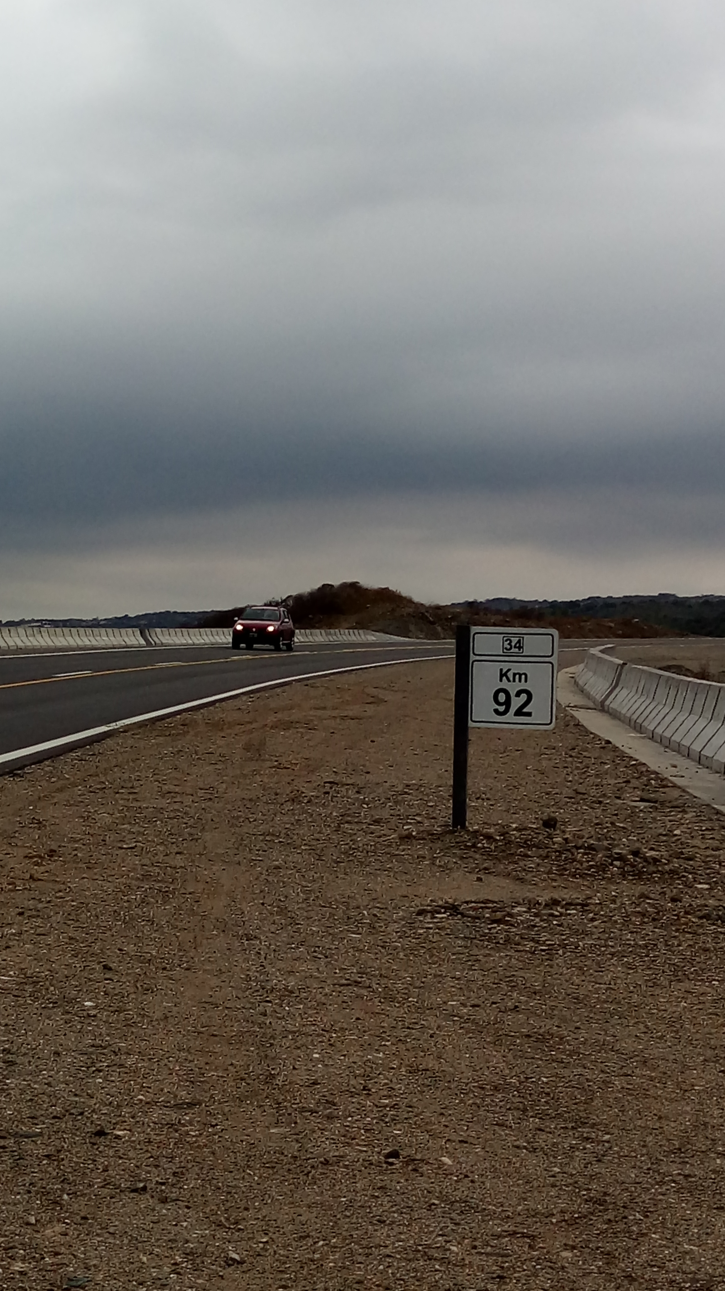 Ultimo tramo construído de la RP 34